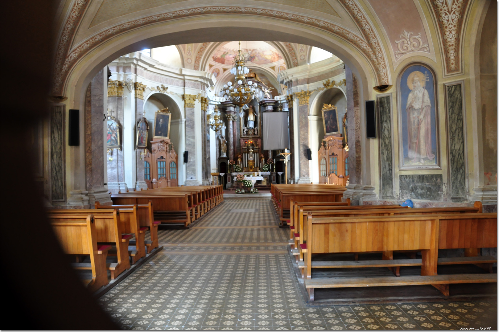 Postojna (99)